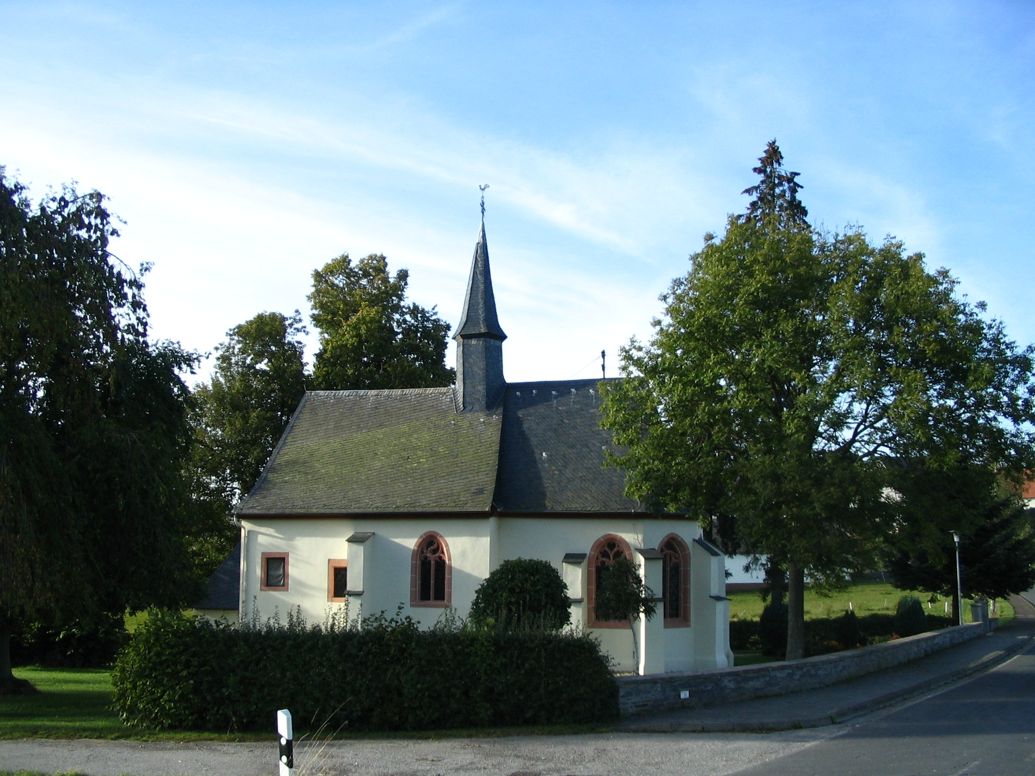 Metzenhausen, historische Kapelle